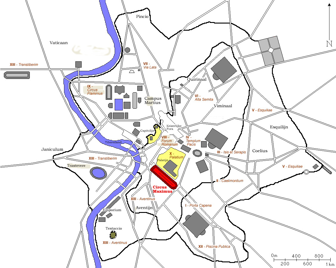 Kaart van antiek Rome waarop het Circus Maximus is uitgelicht. Kaart is afkomstig van FR:wiki en door mij naar een Nederlandse versie bewerkt. Auteurs: nl::fr:User:ColdEel en Gebruiker:Joris1919